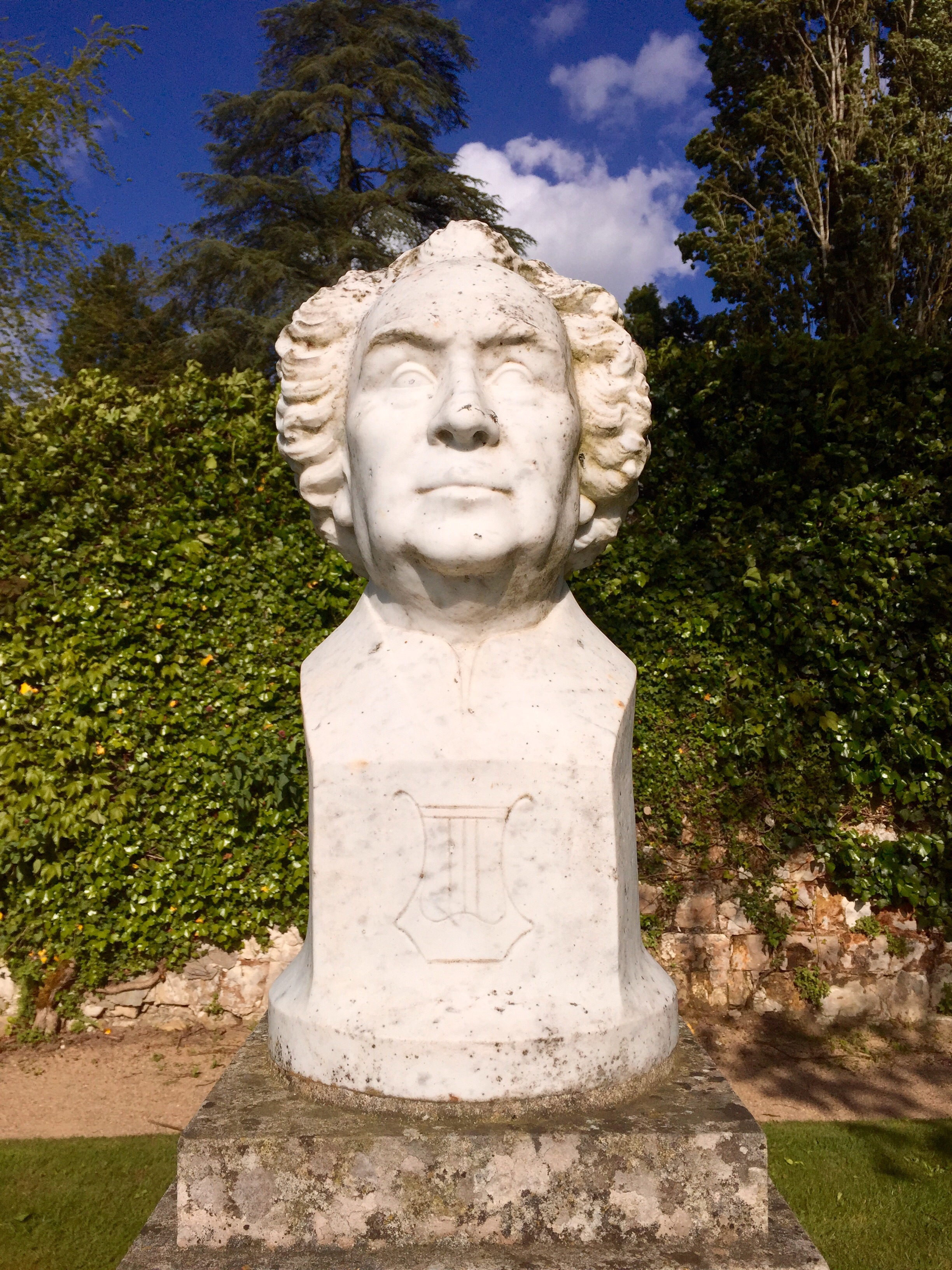 Buste du chansonnier René de Buxeuil, parc René-Boylesve de Descartes (Indre-et-Loire, France).